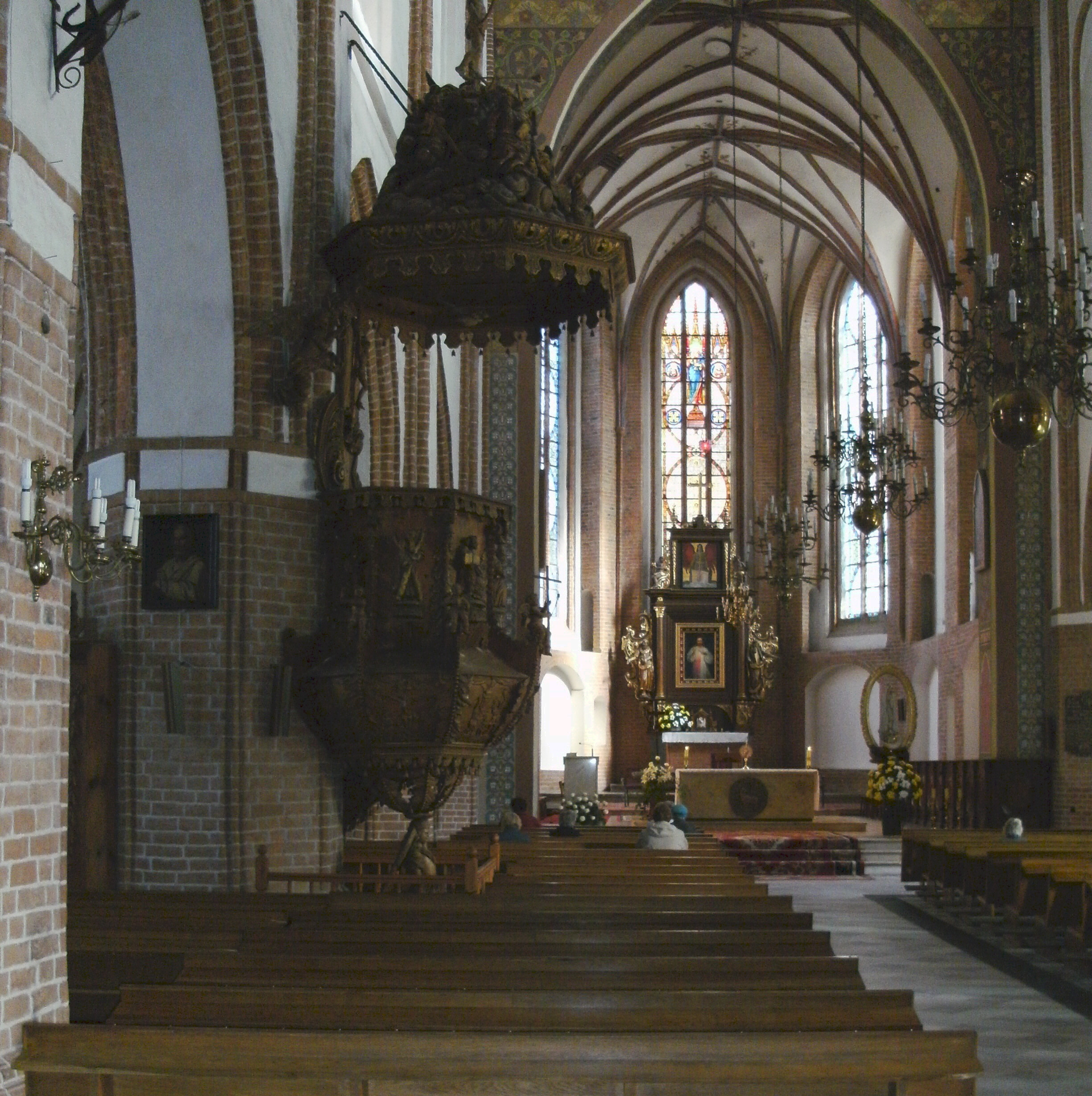 Marienkirche von innen